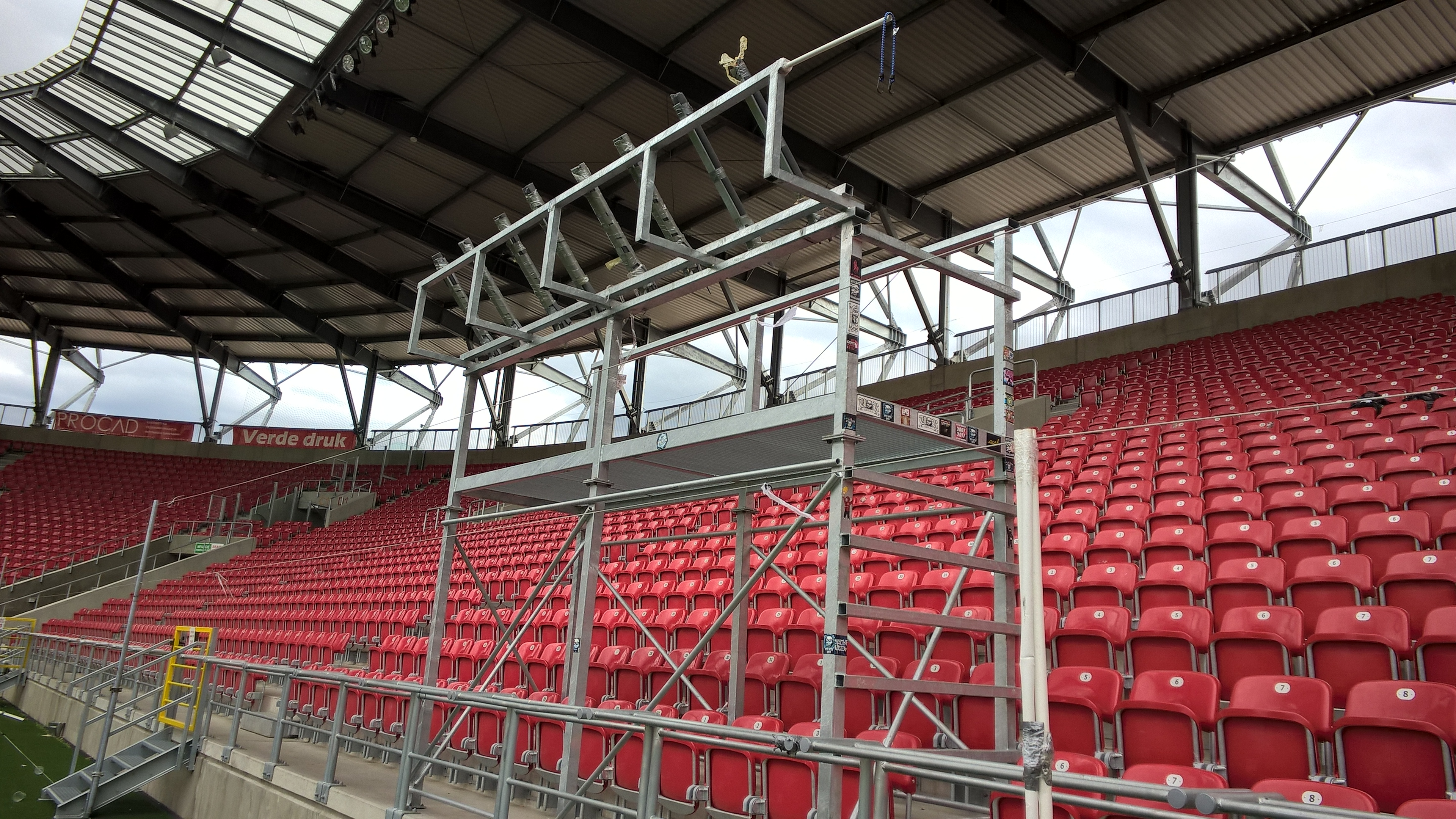 Nowy stadion Widzewa - podest na trybunie D (tzw. „gniazdo”), na którym znalazły się miejsca dla osób prowadzących doping oraz obsługujących bębny.